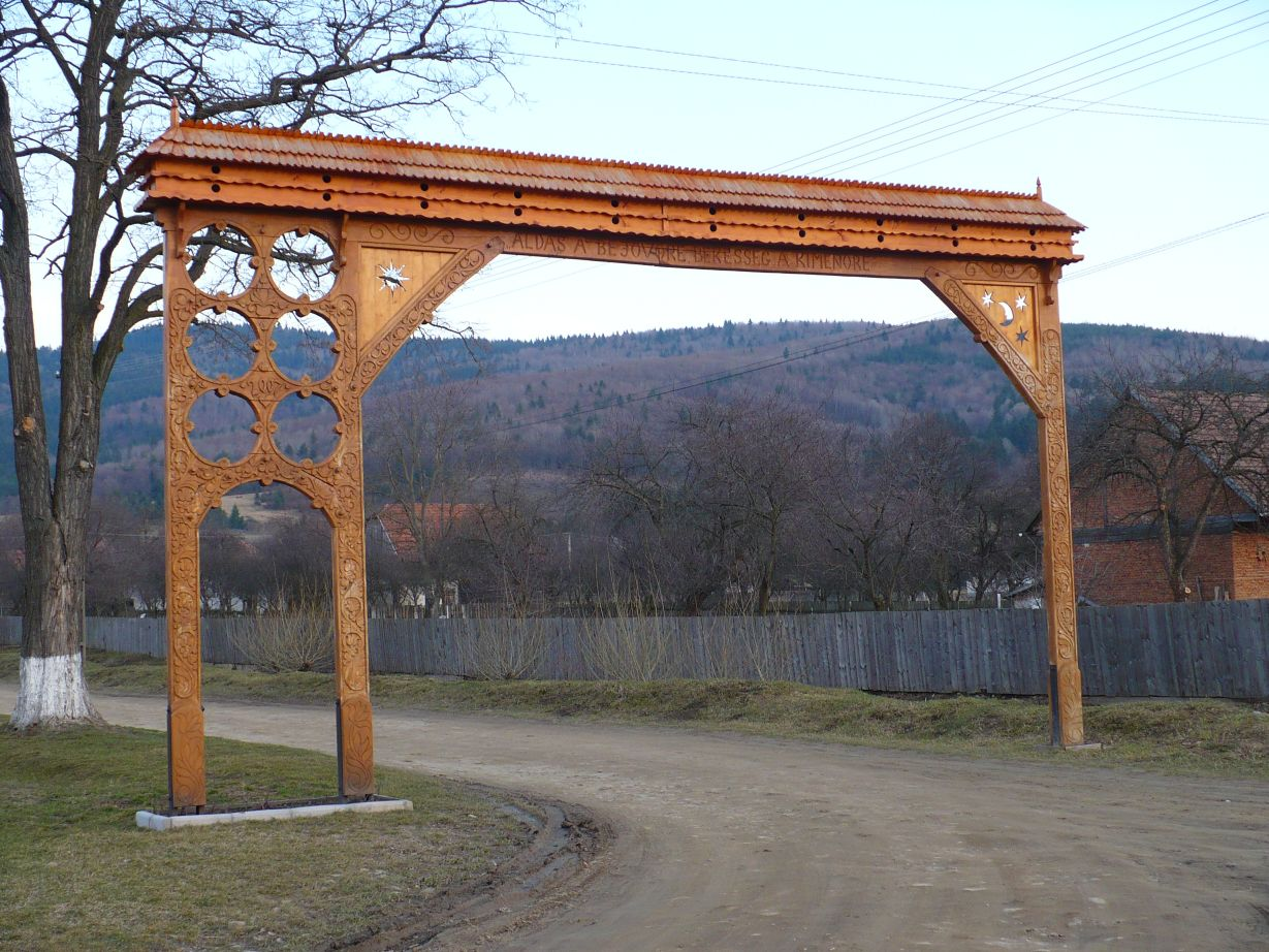 Székelykapu, Haraly, Erdély